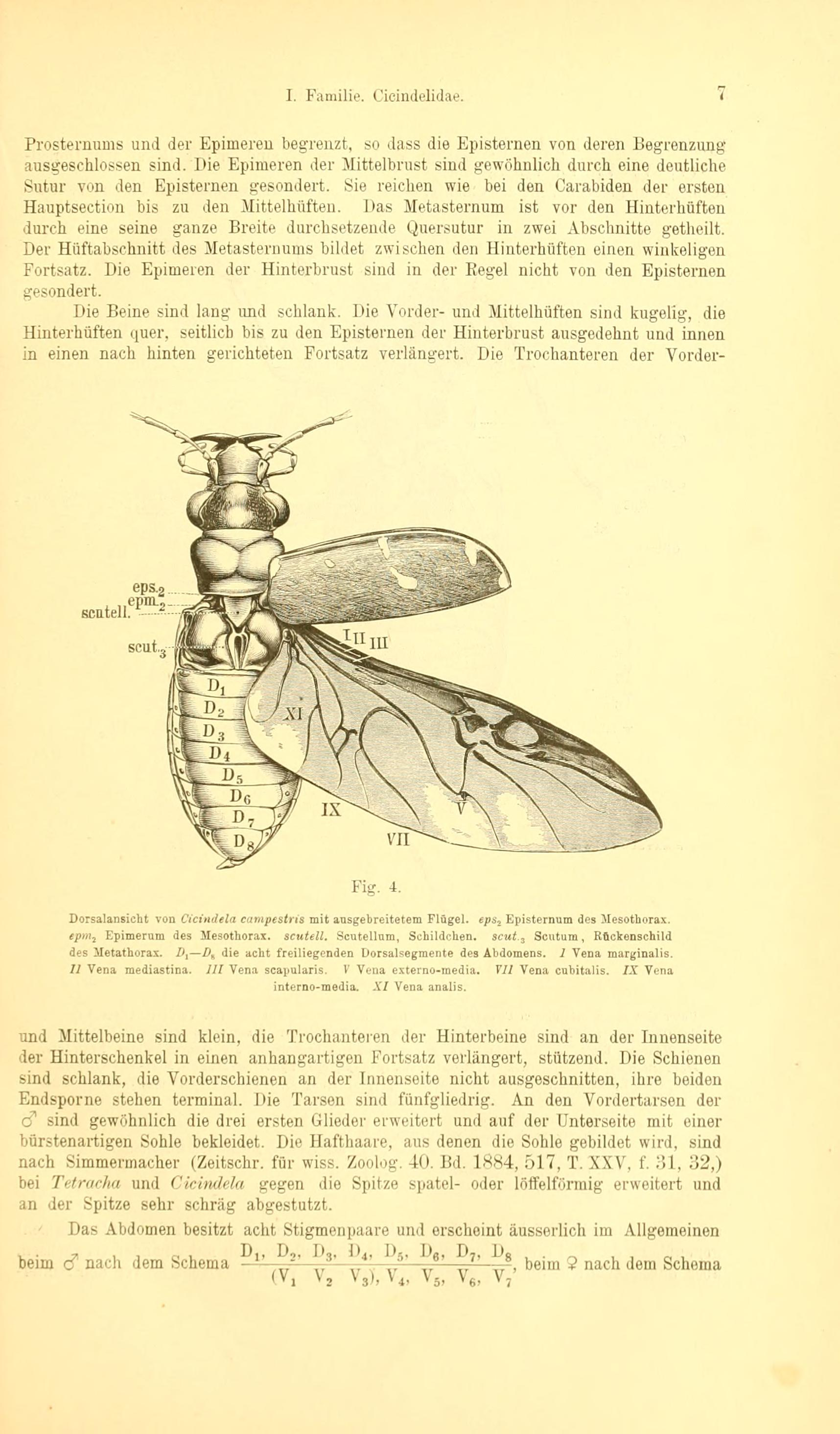 Die Käfer von Mitteleuropa : Käfer der österreichisch-ungarischen Monarchie, Deutschlands, der Schweiz, sowie des französischen und italienischen Alpengebietes / bearbeitet von Ludwig Ganglbauer.